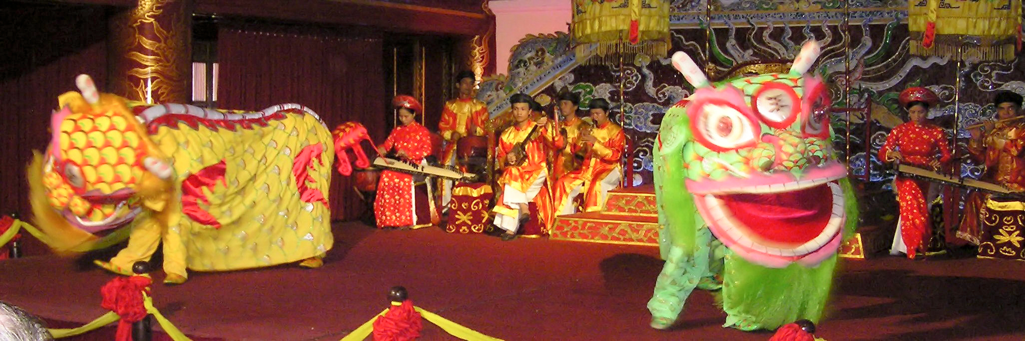 Spectacle traditionnel au Duyêt Thi Duong (Théâtre royal) - Citadelle de Huế - Vietnam